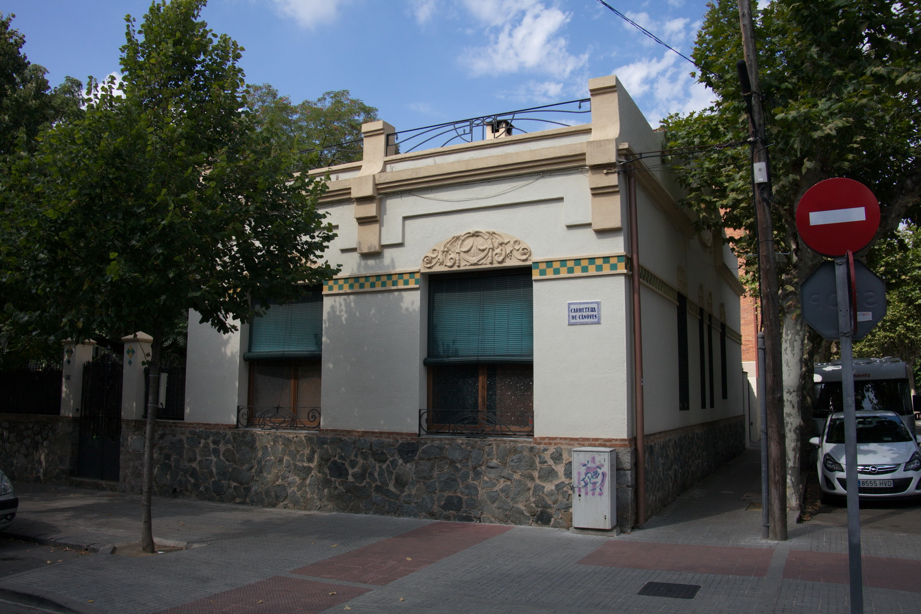 Casa Balvey (Cardedeu)